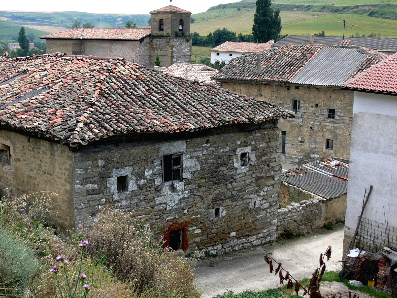 San Millán de Yécora, municipio de La Rioja (España).